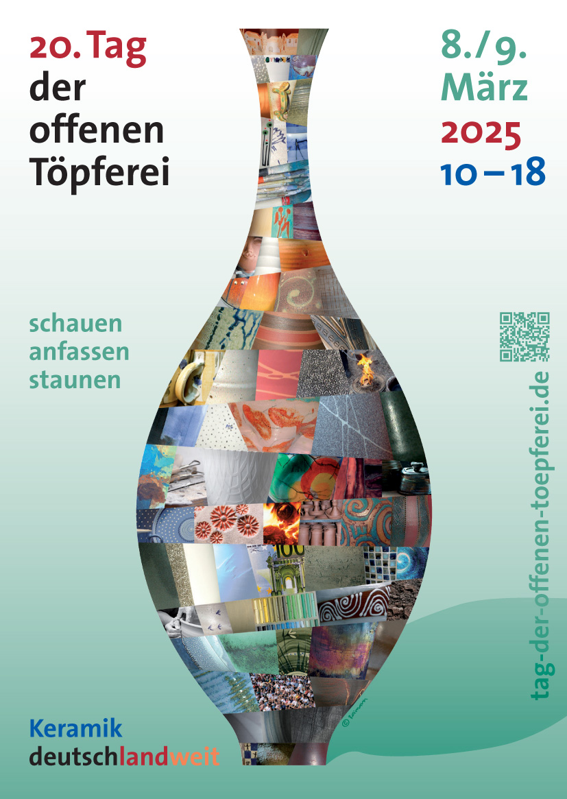 Tag der offenen Töpferei 2011